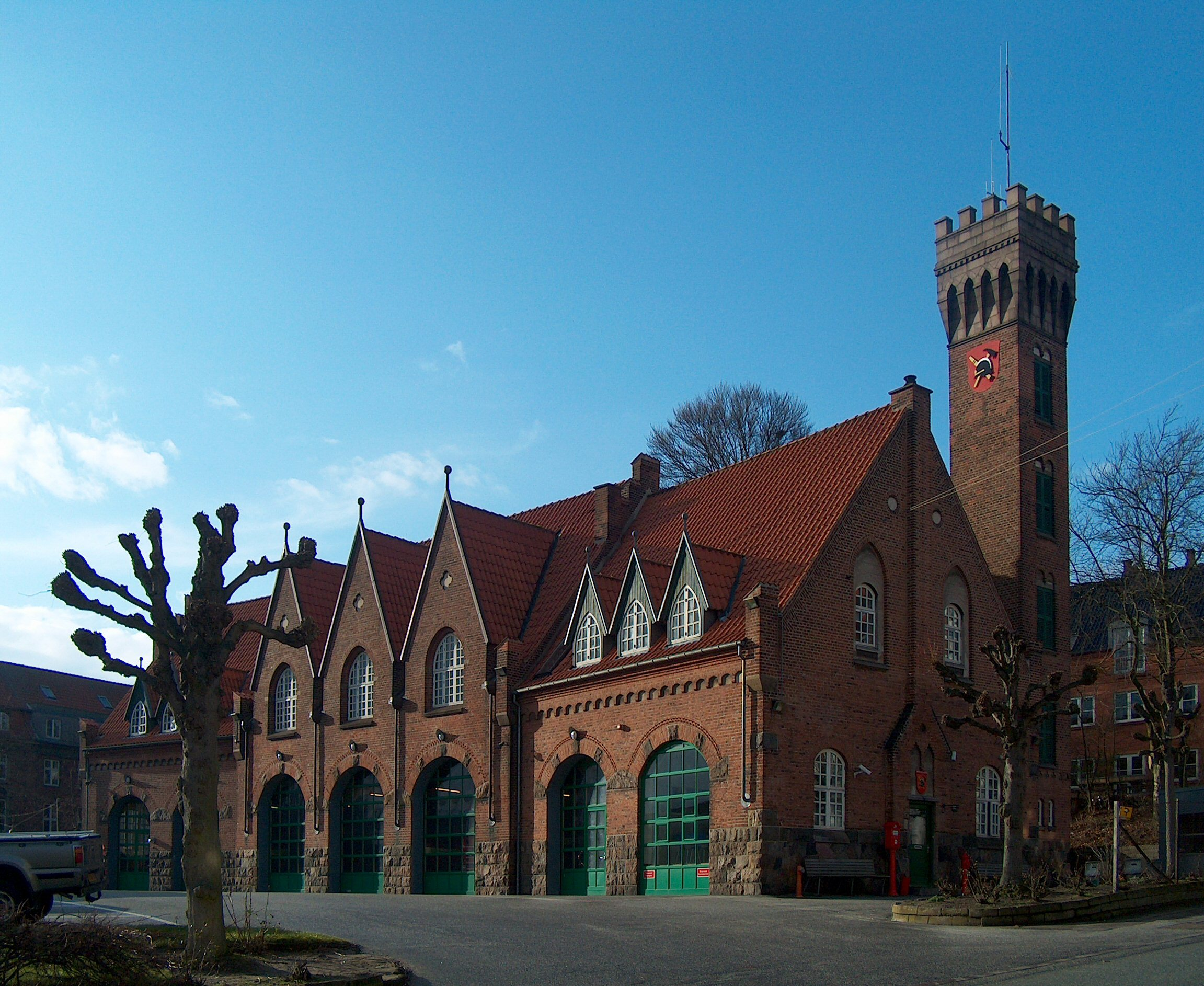 Århus Brandstation i Ny Munkegade i Århus